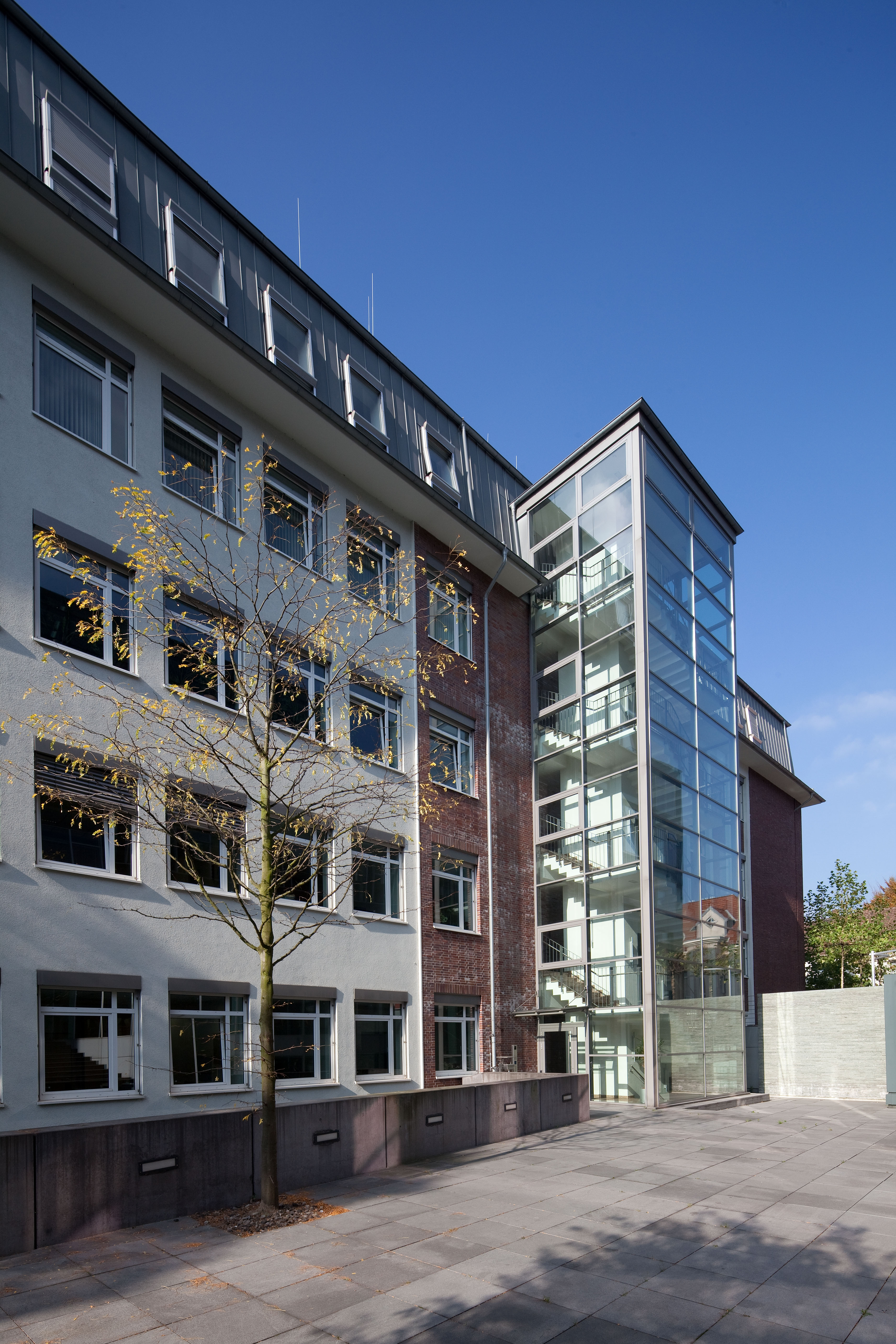 Hauptverwaltung der HDN in Bochum